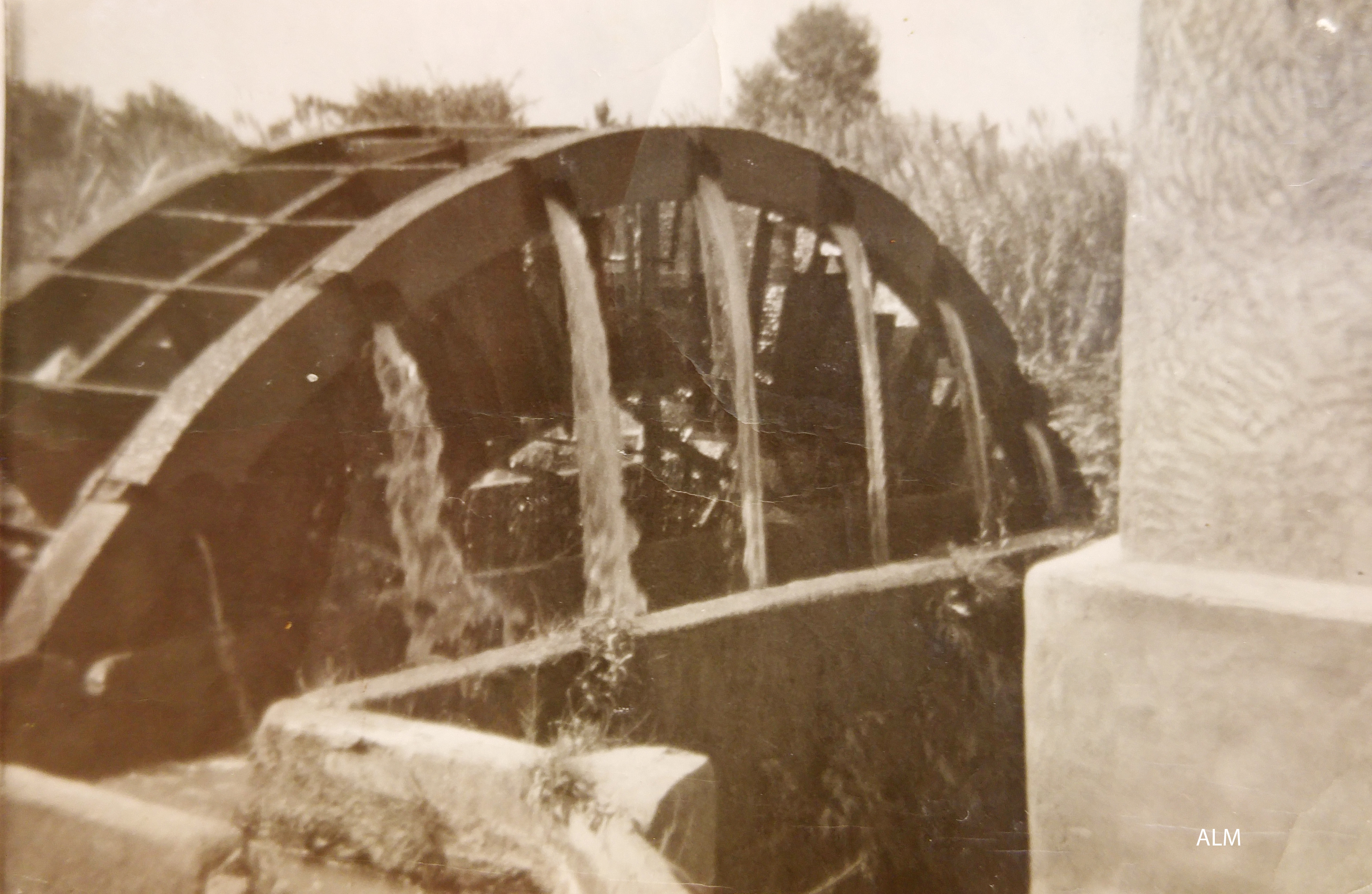 Moquita en funcionamiento, año 1962.